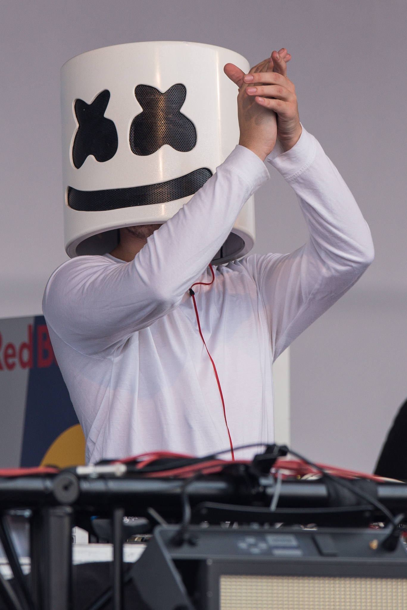 Festival,Konzert,Livekonzert,Livemusik,Mainstage,Marshmello,Musik,Open Beatz 2016